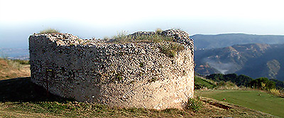 resti dell'antica Motta Anomeri di Reggio Calabria